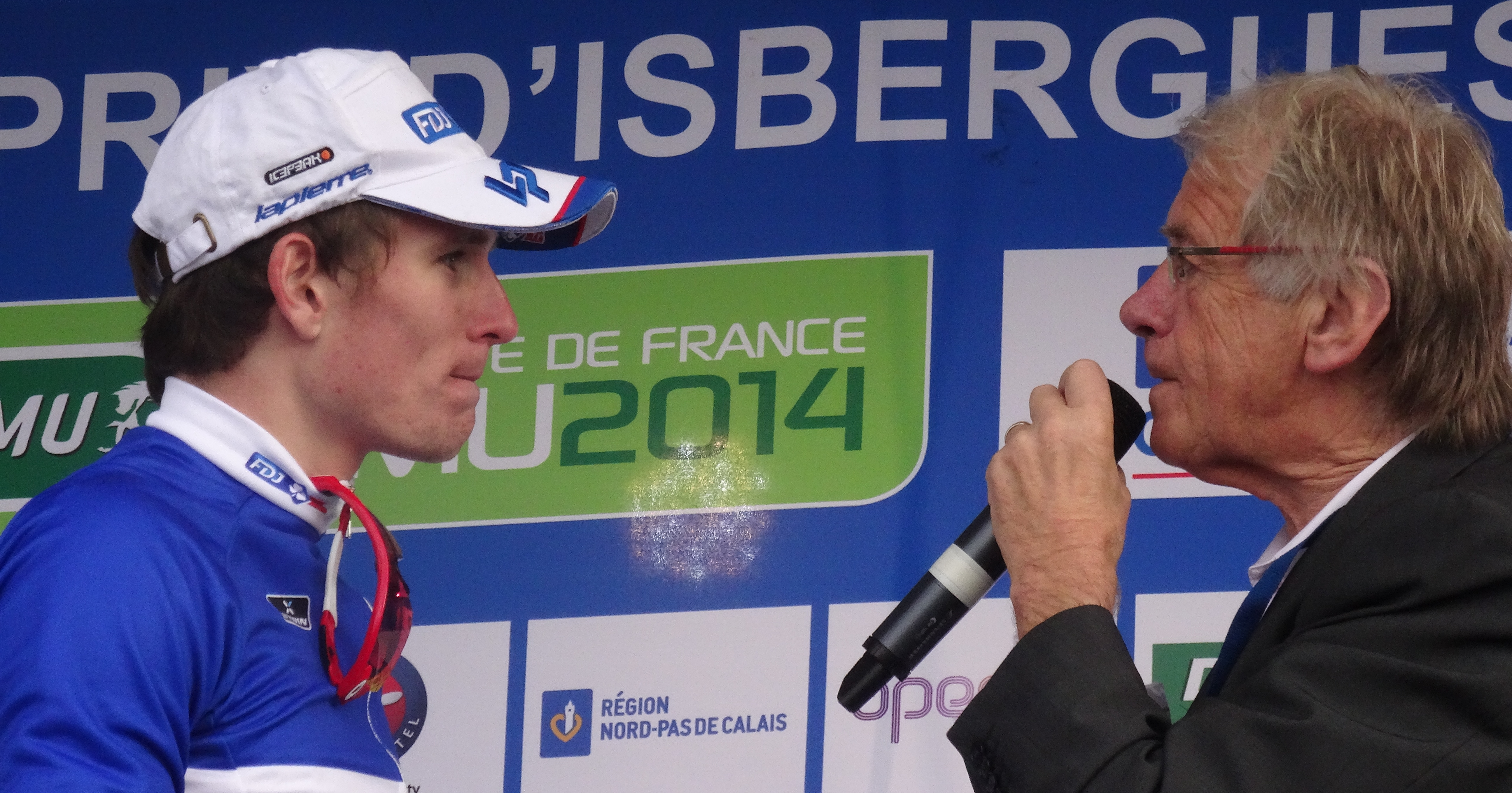 Reportage photographique réalisé le dimanche 21 septembre à l'occasion du départ et de l'arrivée du Grand Prix d'Isbergues 2014 à Isbergues, Nord-Pas-de-Calais, France.